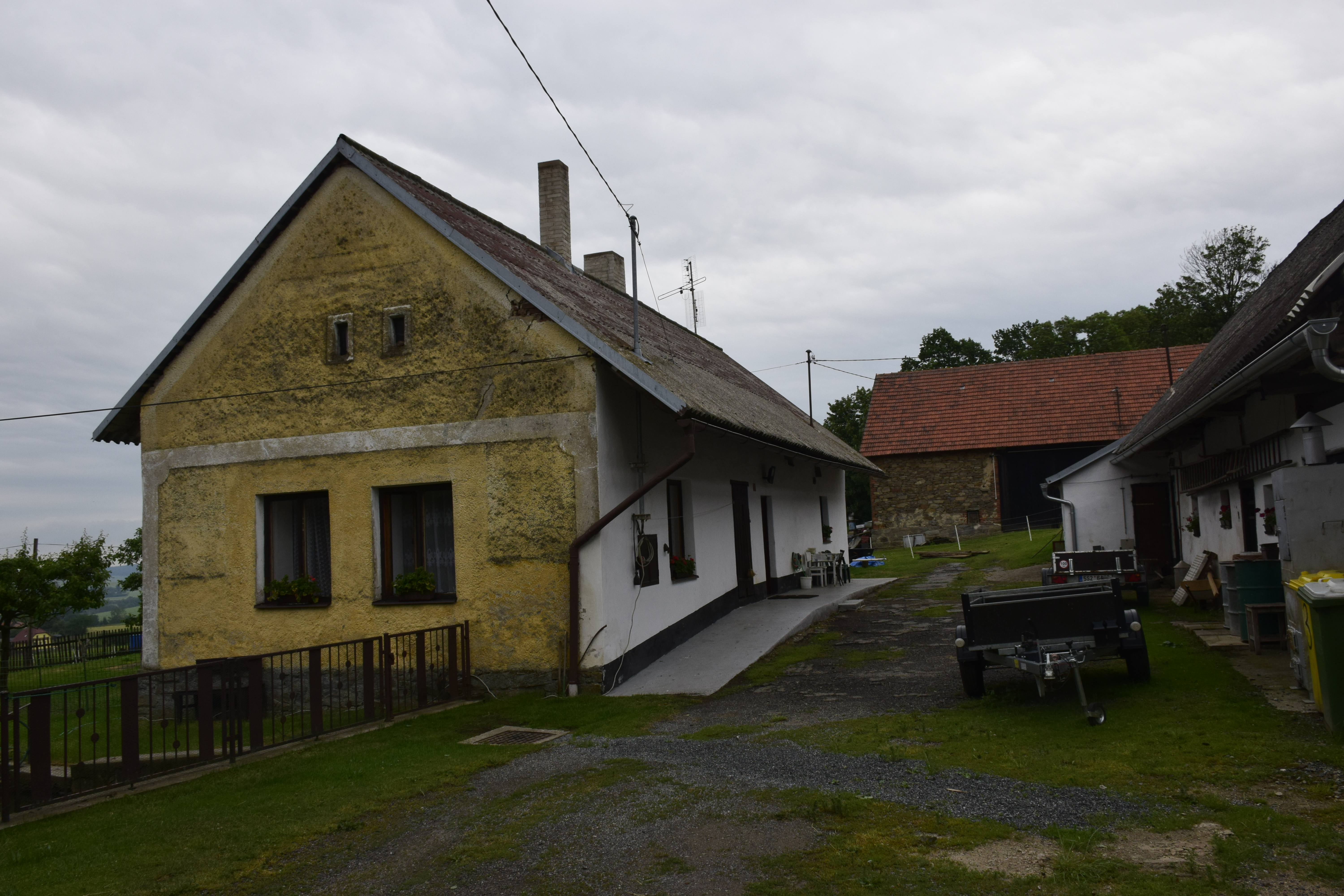 Větrov (Votice), Česká republika.